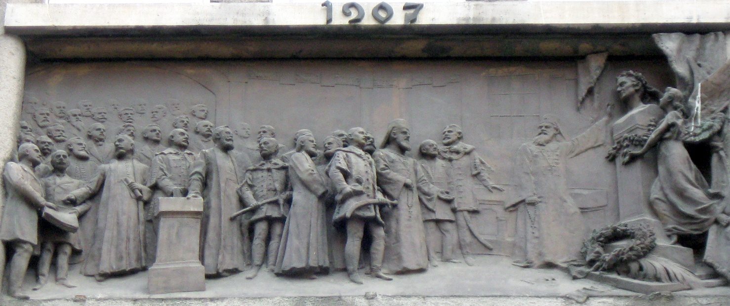 Tökölyanum, 1907-es dombormű (Budapest, V. ker., Veres Pálné utca 17–19.)